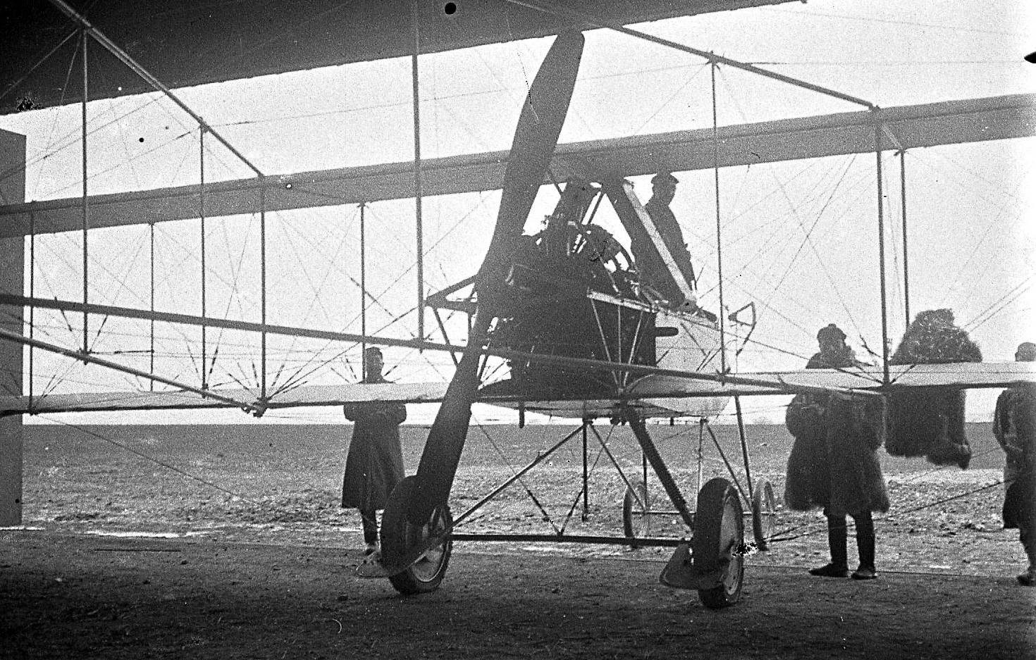 Vue du moteur et de l'hélice d'un avion biplan Voisin de MM. Sauzay et Roussillon, près d'Amiens (Somme). 1915. Guerre 1914-1918.